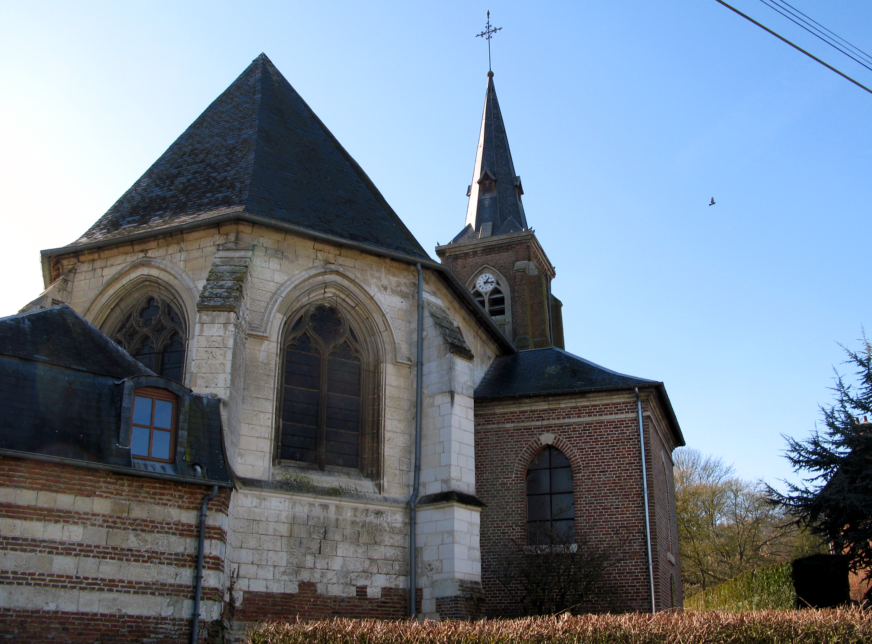 Guyencourt-sur-Noye (Somme, France) - Chevet de l'église Saint-Firmin-le-Confesseur. . .